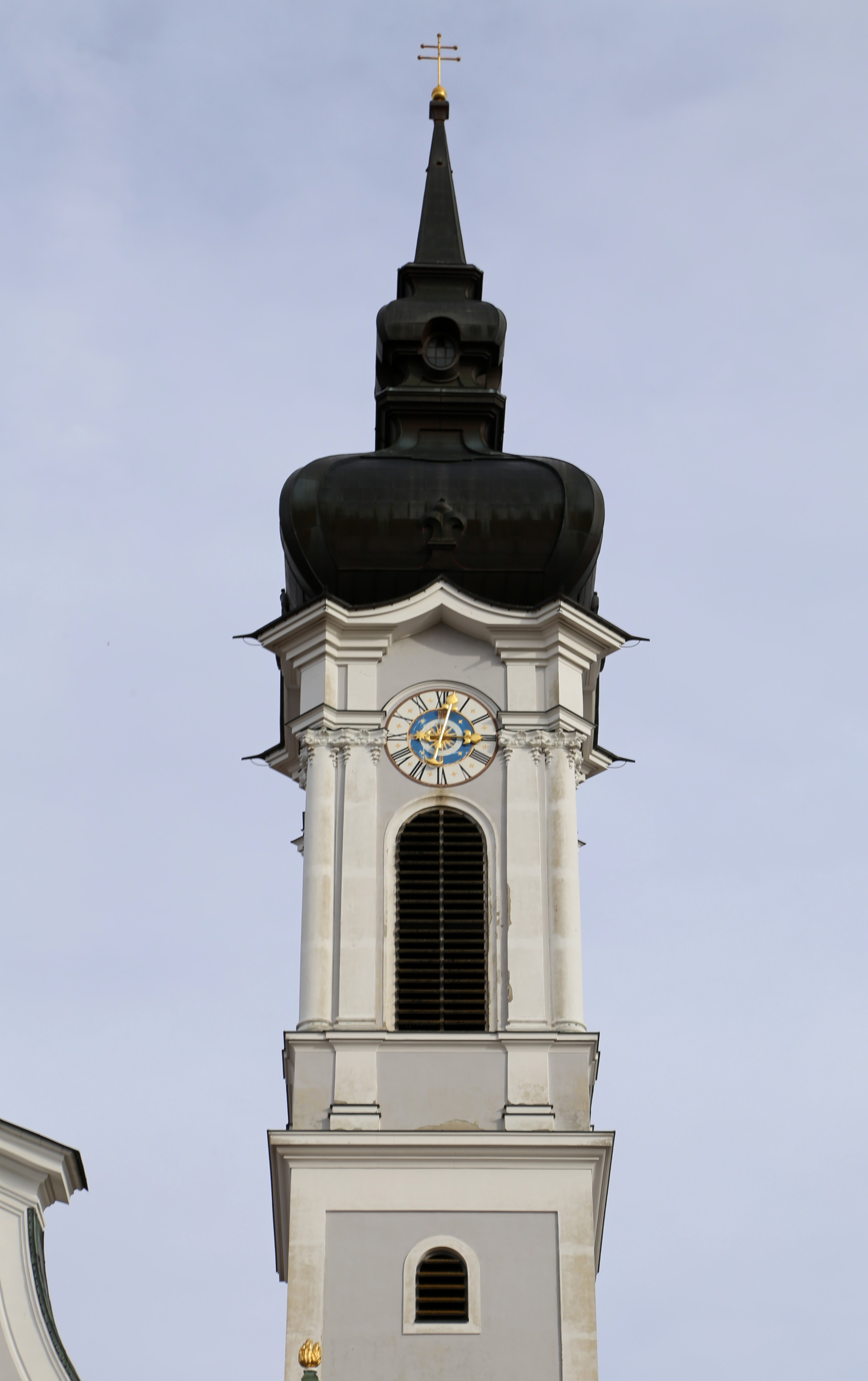 Marienmünster Dießen